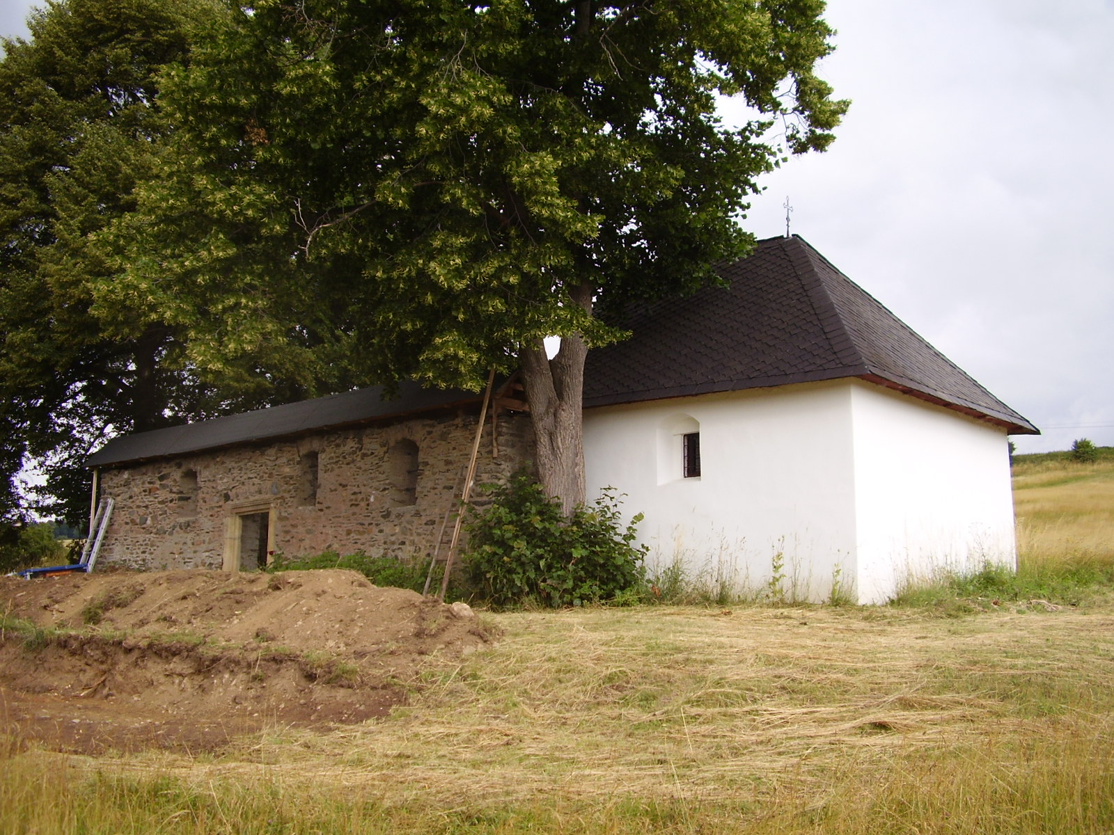 Kaple sv. Marie Magdaleny, Majdalenka - bývalý kostel (Hlásnice), na návrší za vsí, hranice k. ú. Hlásnice a Svojanov - Předměstí, Hlásnice